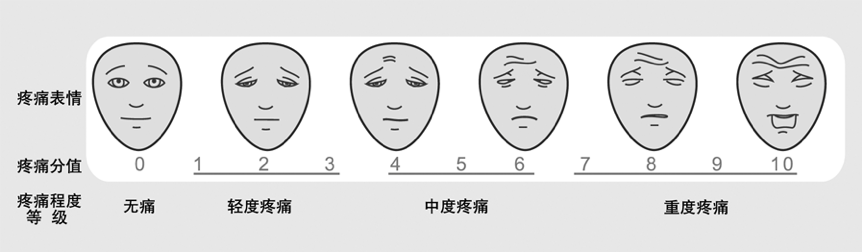 中文（中国大陆）: 面部表情疼痛评分量表